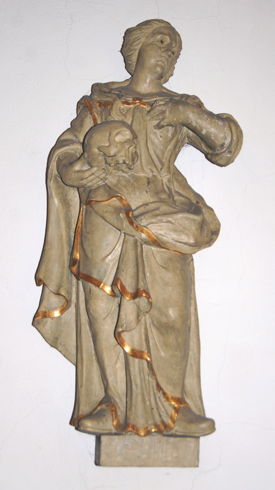 Hölzerne Statue der Hl. Magdalena mit Totenkopf in der Klosterkirche St. Marien Burlo, Stadt Borken (NRW). Die Entstehung der Figur wird auf das Ende des 17. / Anfang des 18. Jahrhunderts datiert. This is a photograph of an architectural monument. A1 - A 26